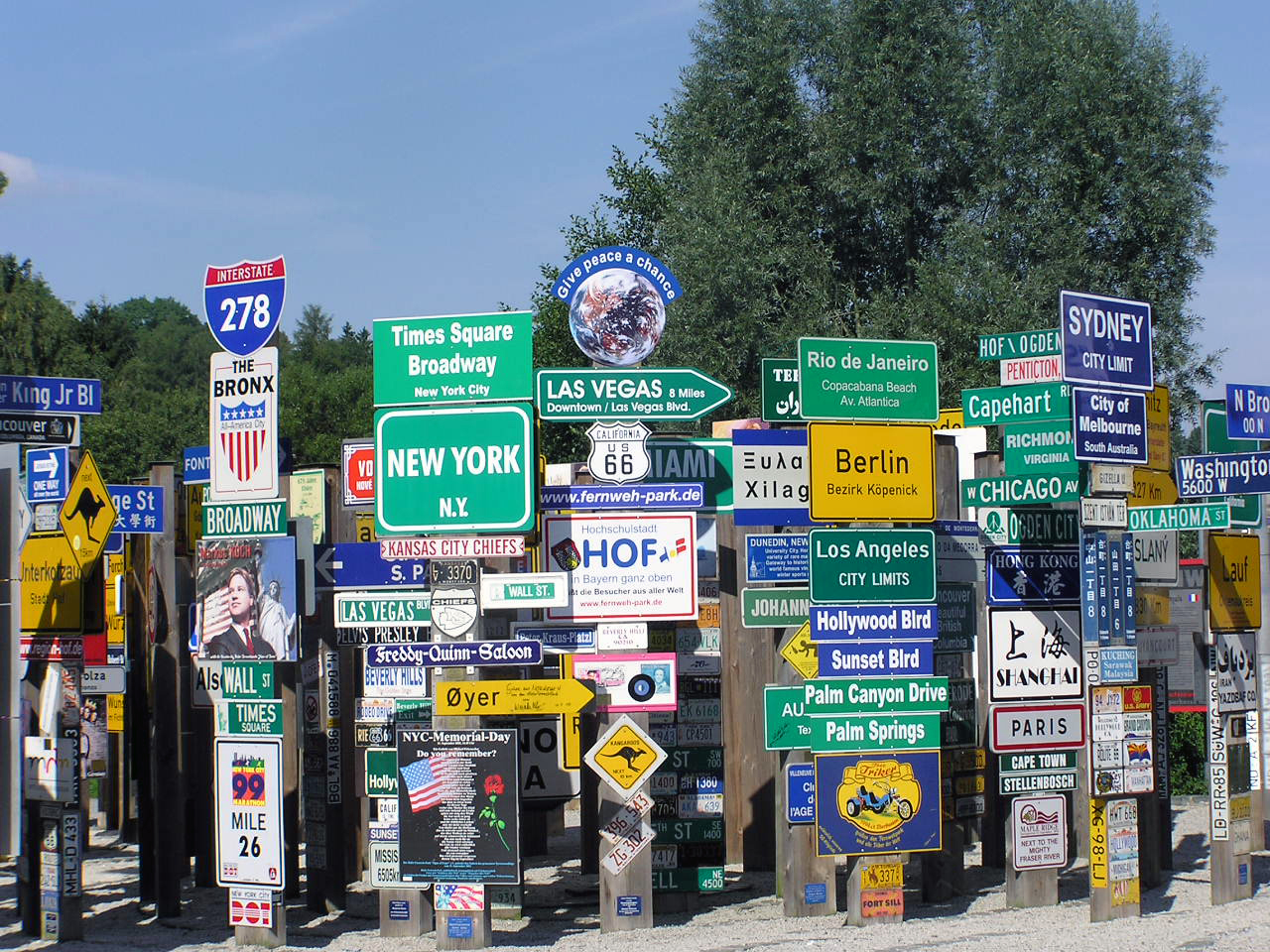 Description: Fernwehpark in Hof Source: Eigene Fotografie Date: 28. August 2004 Author: Schubbay